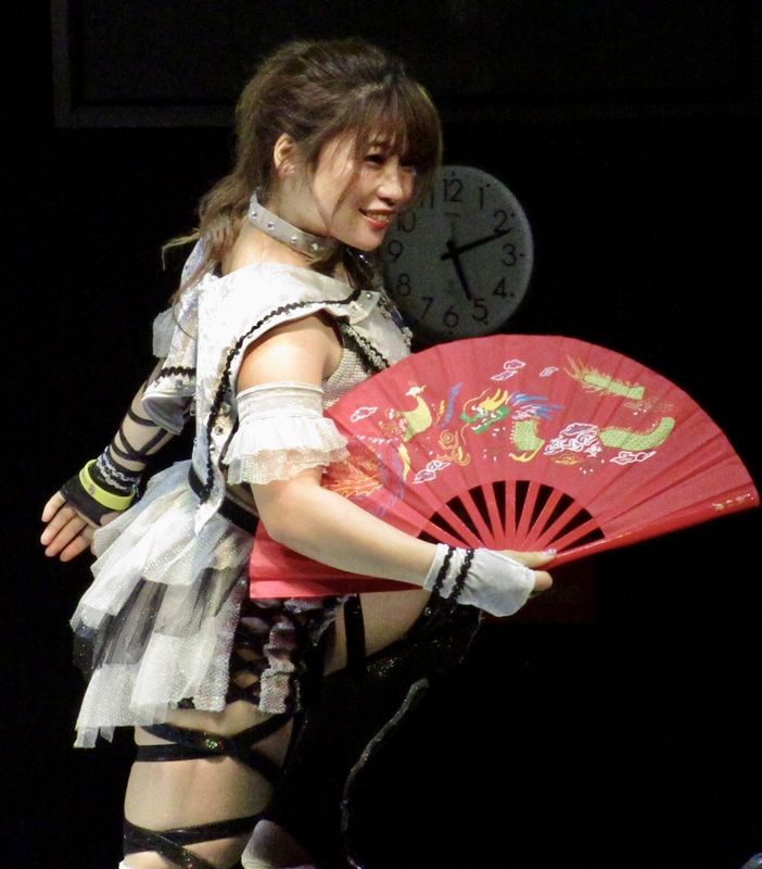 2019年大阪大会にて